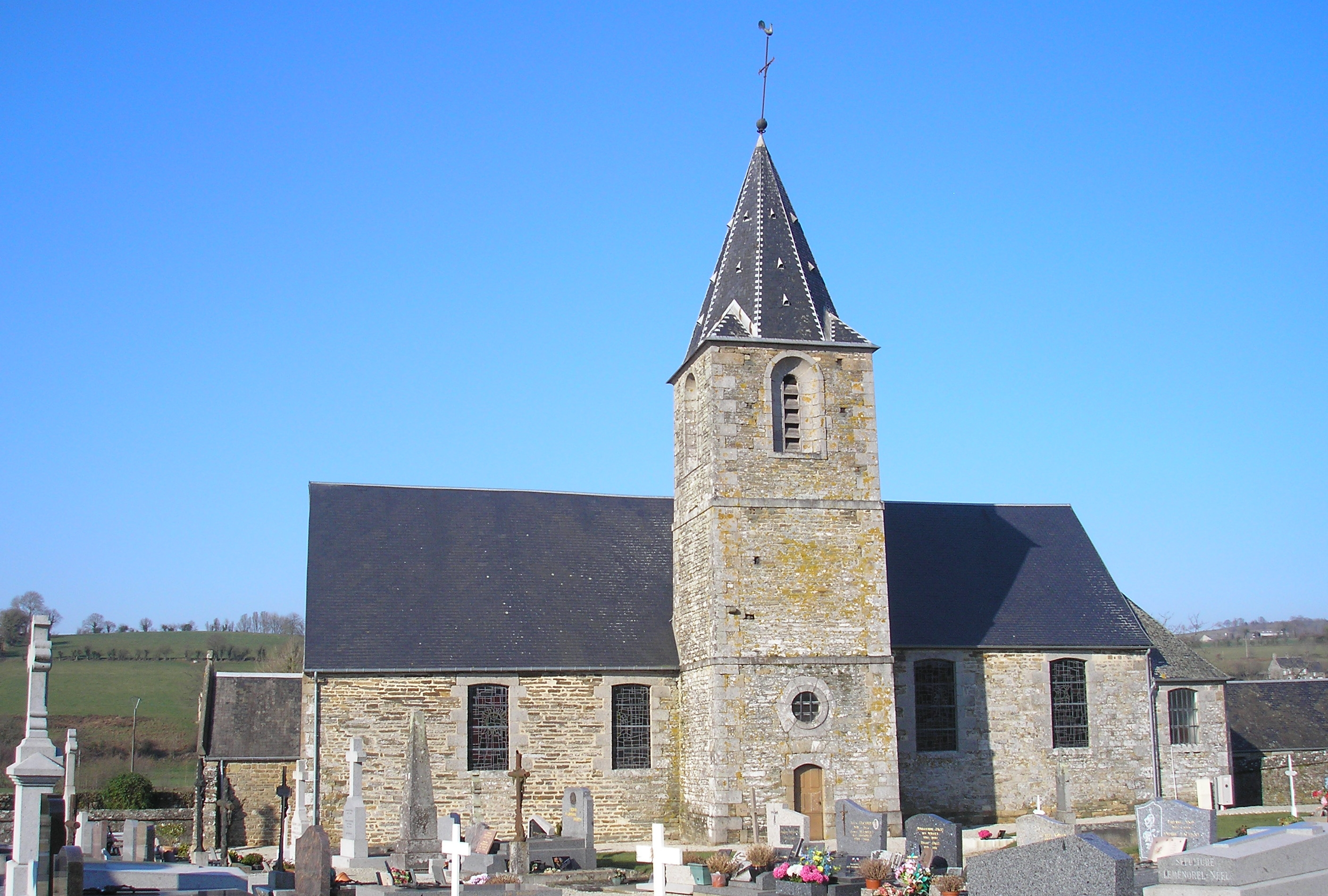 Sainte-Marie-Outre-l'Eau (Normandie, France). L'église Notre-Dame.